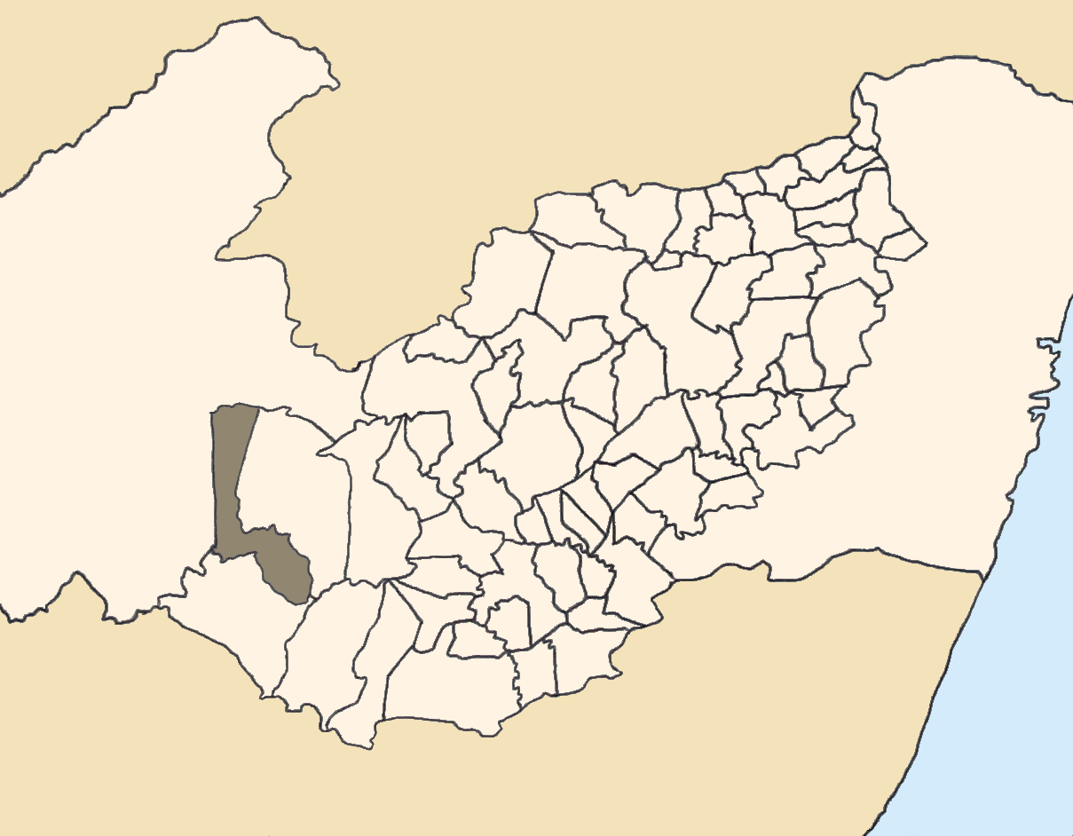 Mapa da mesorregião Agreste de Pernambuco (Brasil) subdivida em municípios. Em destaque, o município de Tupanatinga. Map of the brazilian state of Pernambuco (mesorregião Agreste) showing the city of Tupanatinga. Imagem tratada com o GIMP. Image made with GIMP.